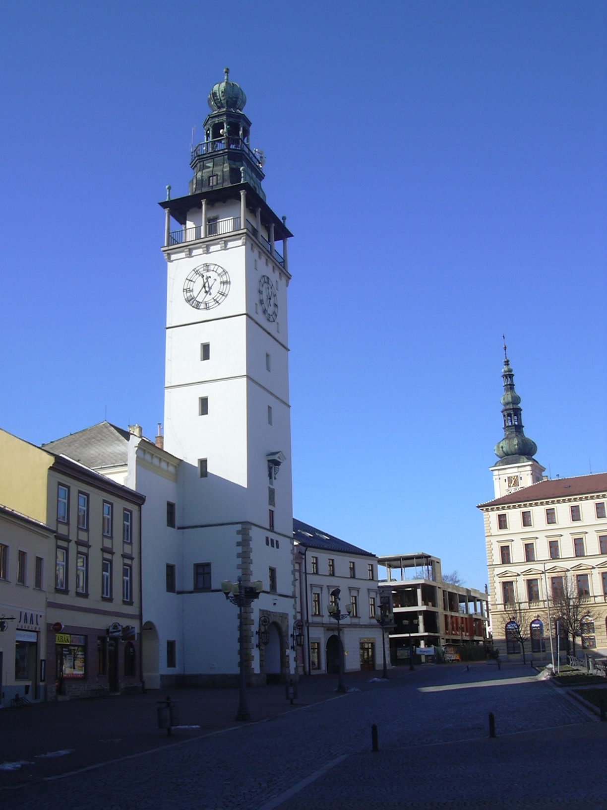 radnice (Vyškov- czech republic)